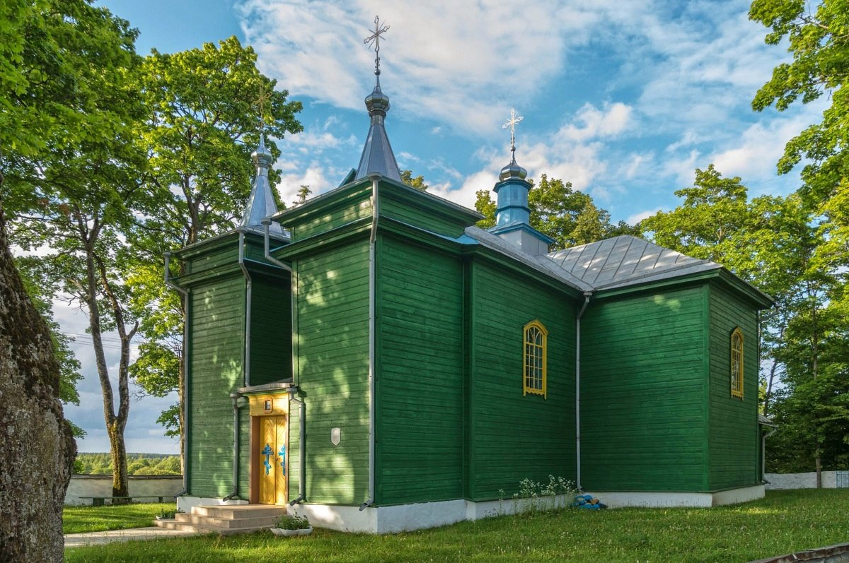 Кавалі. Свята-Успенская царква